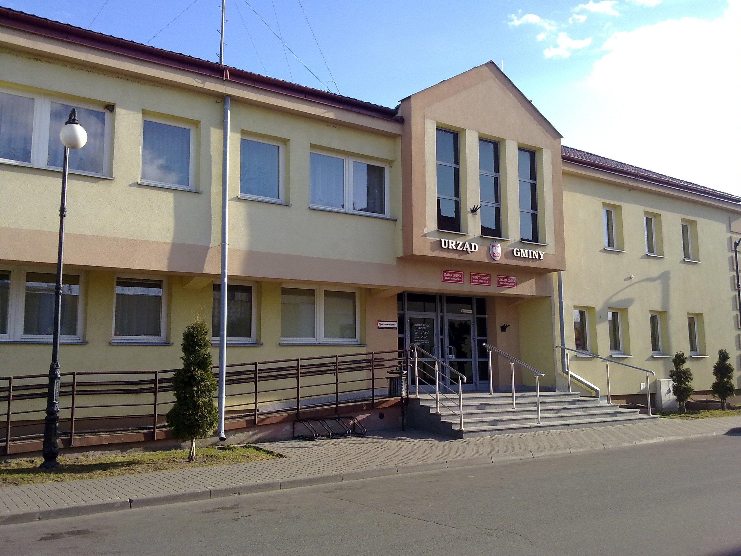 Biała Podlaska. Urząd Gminy.